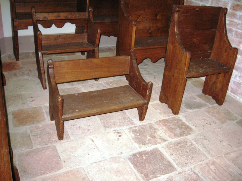 Sedia per bambini nella Sinagoga di Carmagnola.